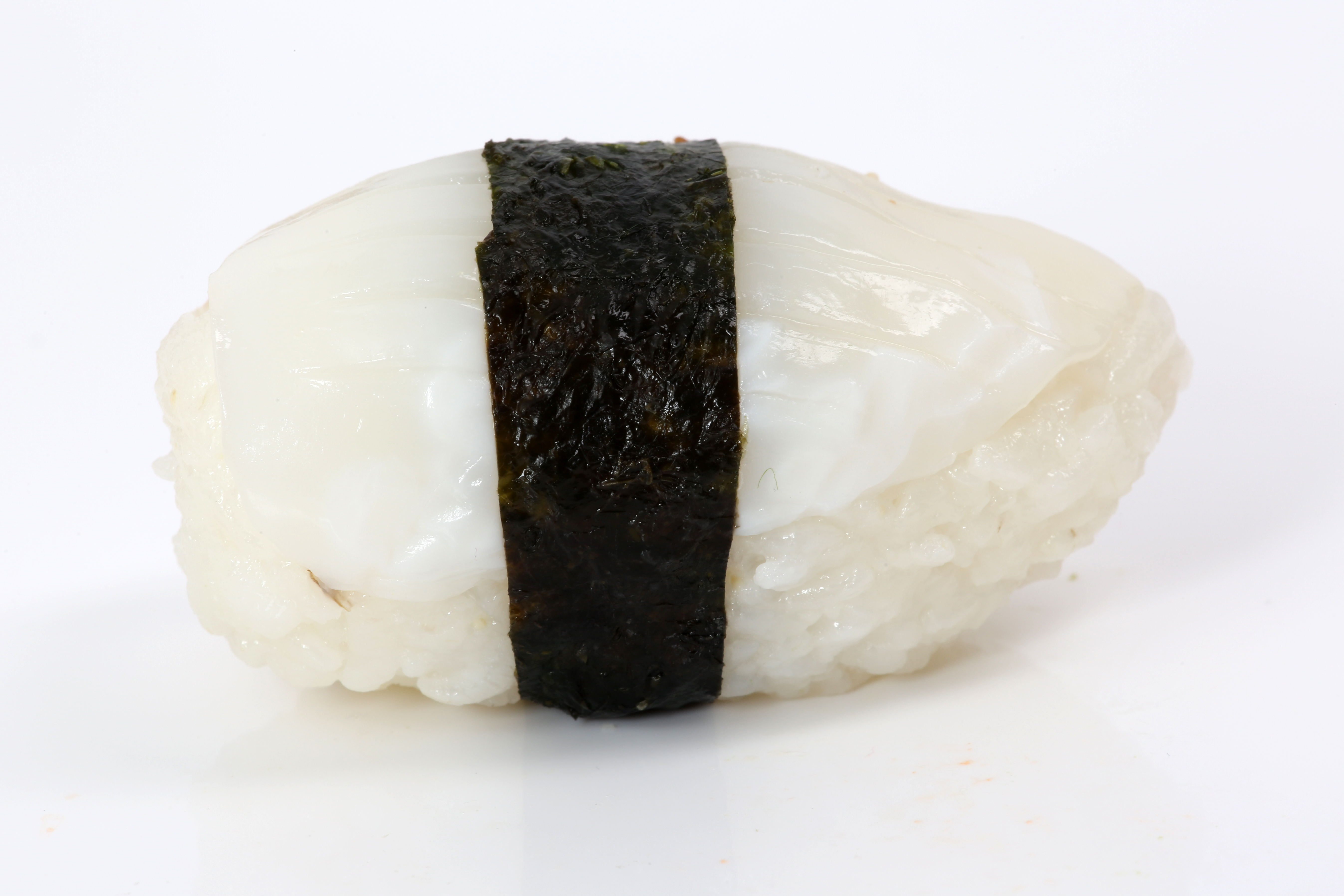 Nigiri Sushi